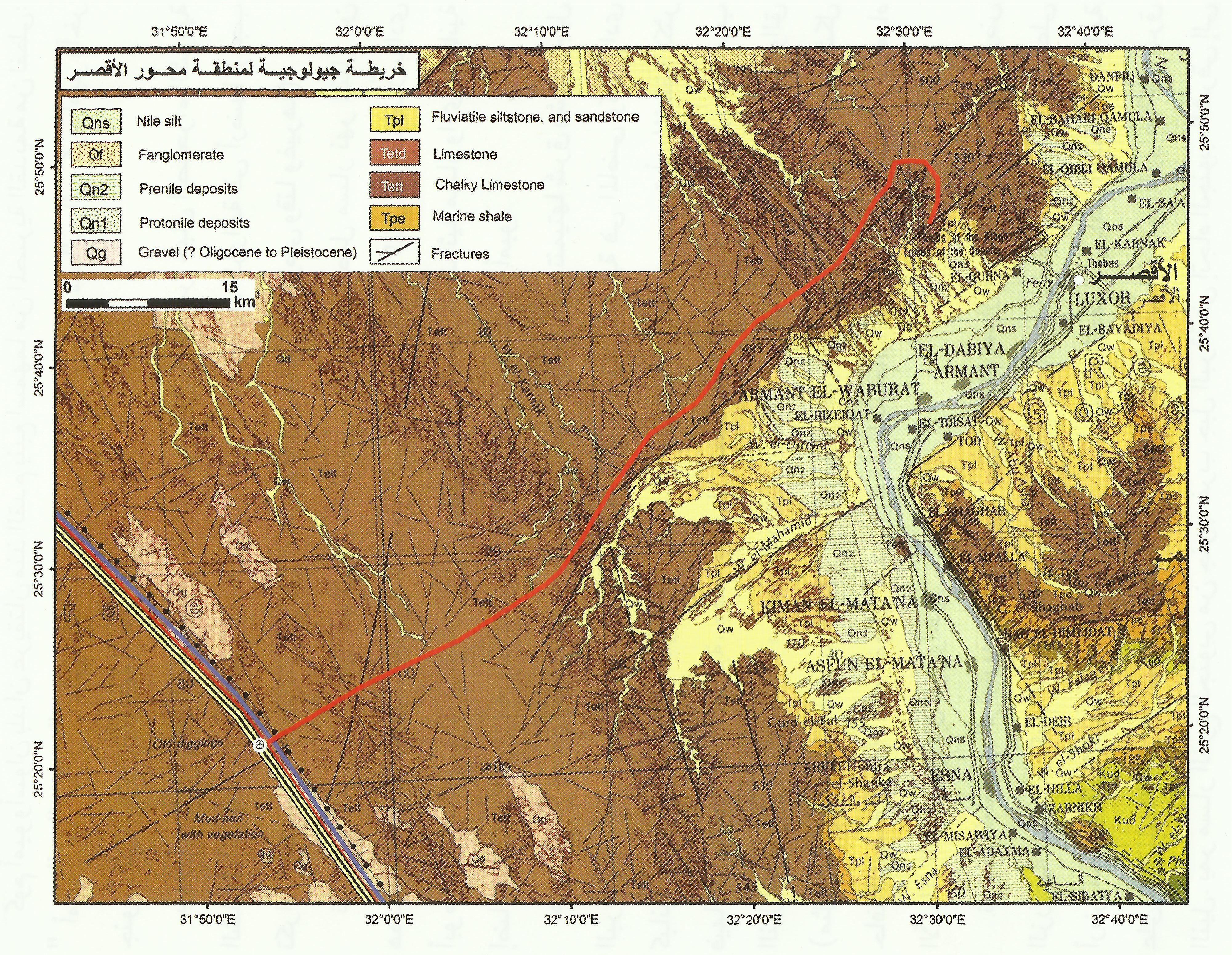 محور تعمير الأقصر